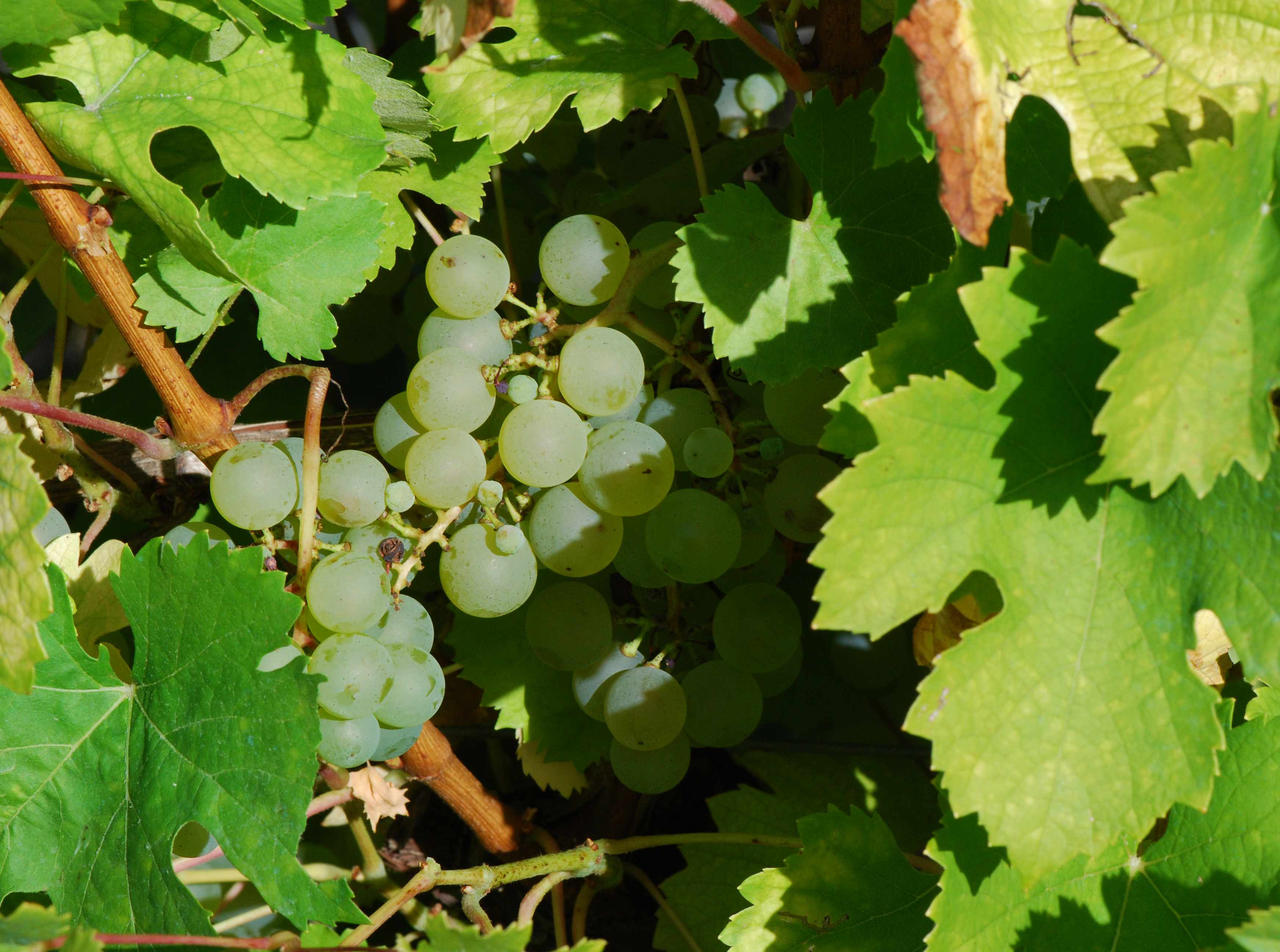 Jurançon blanc, Conservatoire du vignoble charentais, Cherves 17